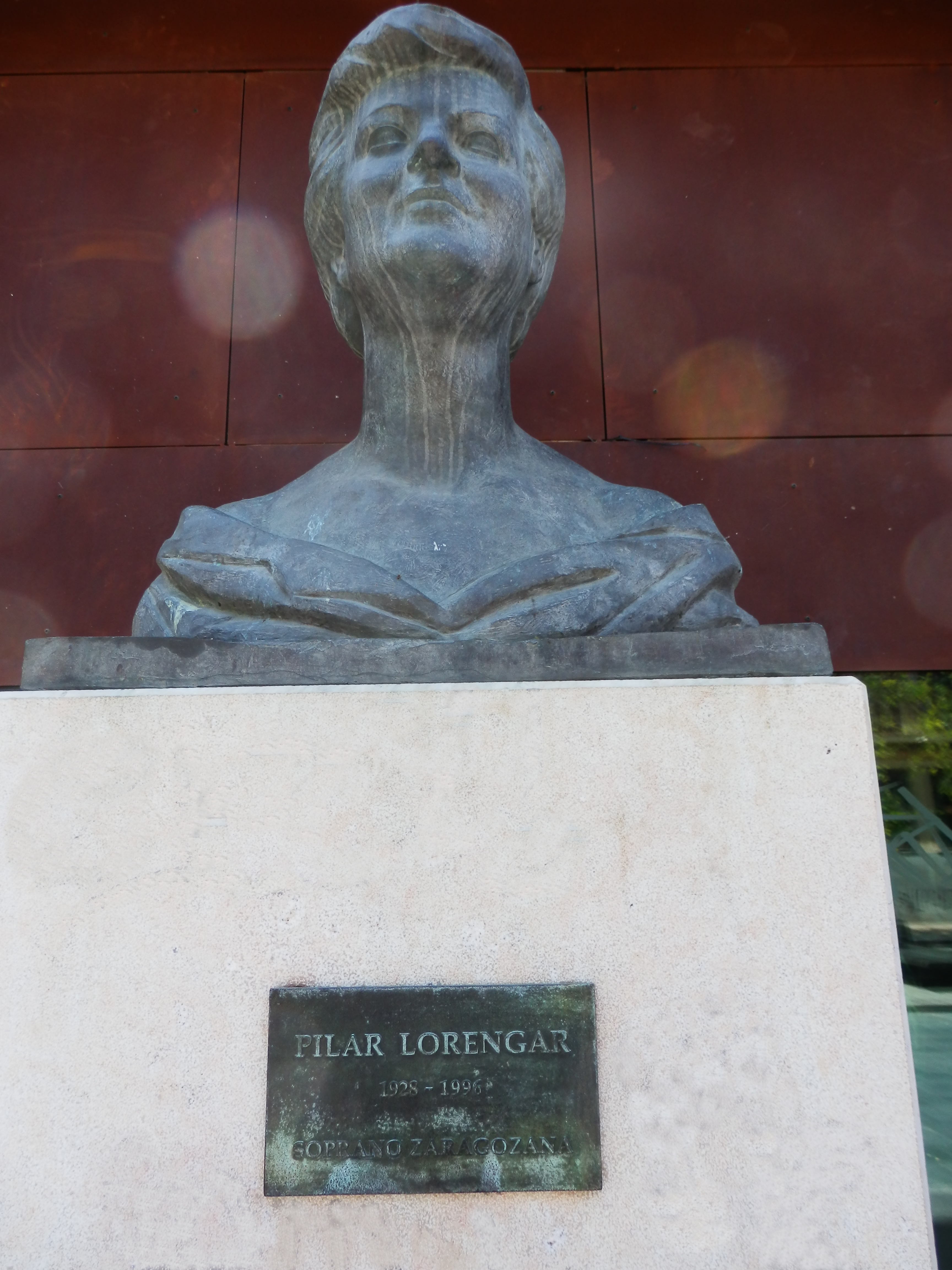 Estatua de Pilar Lorengar en Zaragoza.